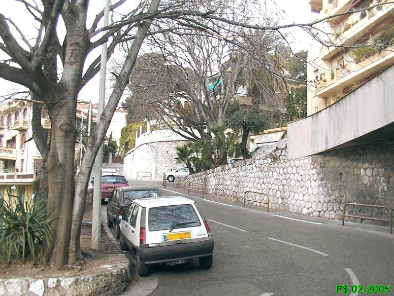 Avenue Bieckert en montant vers le sommet de la colline de Carabacel. Quartier Carabacel